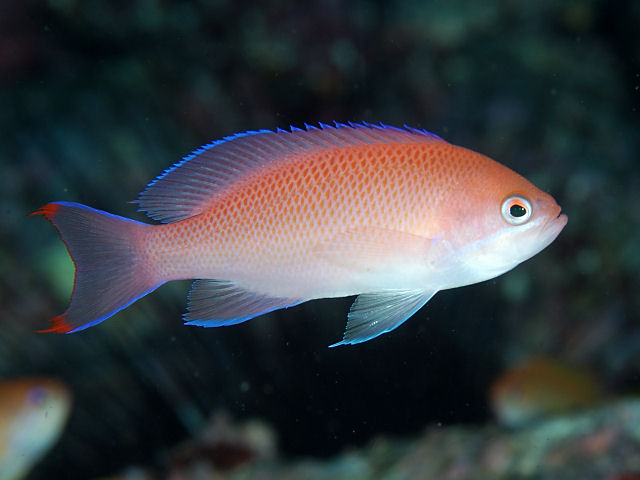 アカオビハナダイ♀ Pseudanthias rubrizonatus